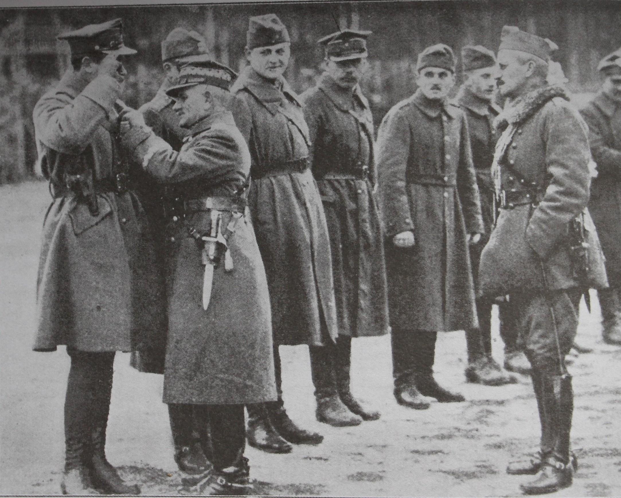 Dekoracja oficerów 10-ej eskadry wywiadowczej orderem Virtuti Militari przez gen. Leonarda Skierskiego w Brześciu nad Bugiem w październiku 1920. Na fotografii gen. Leonard Skierski dekoruje dowódcę eskadry ppłk Jana Kieżuna.